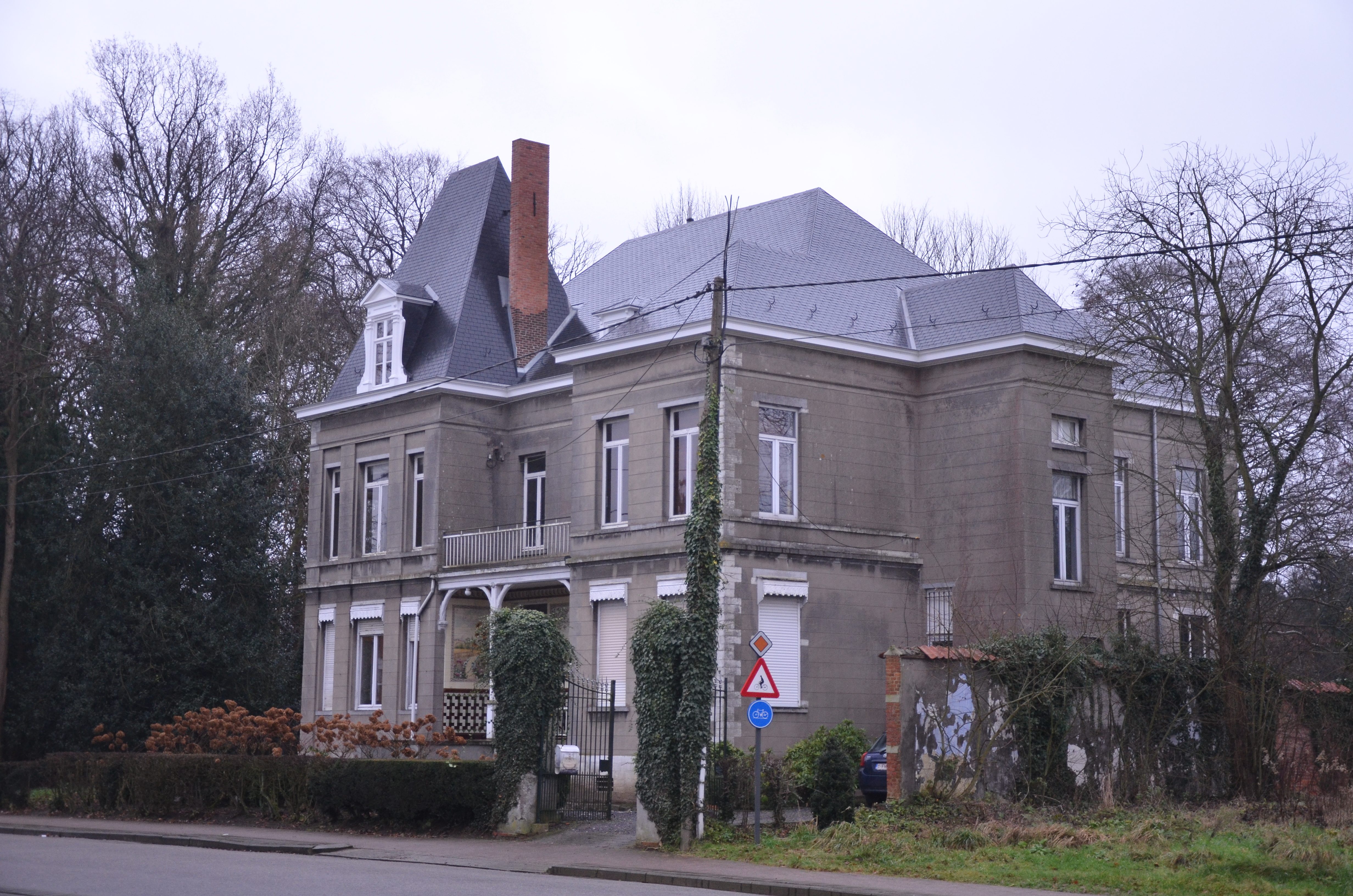 Landhuis, dubbelhuis